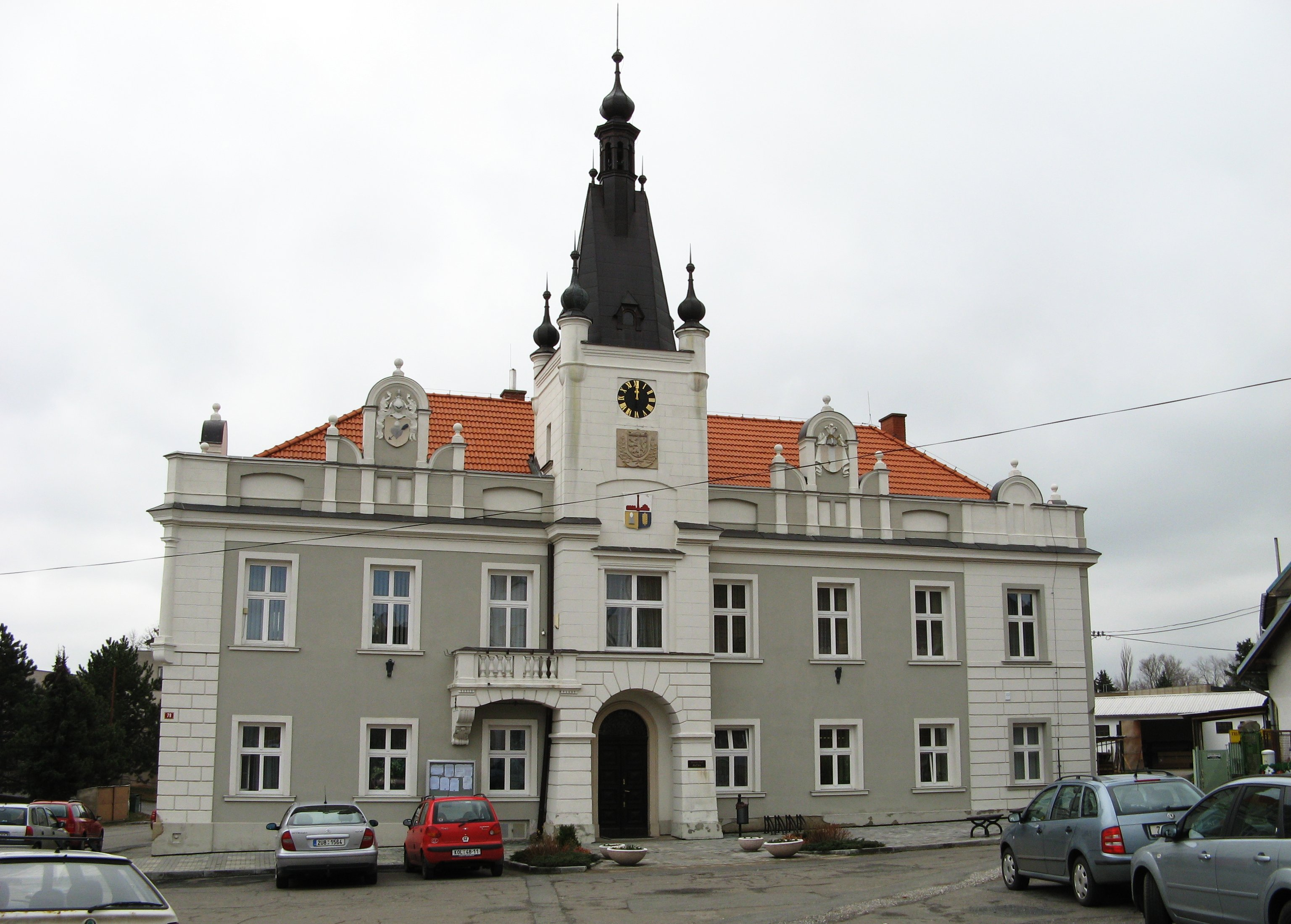 Budova Městského úřadu v Pečkách